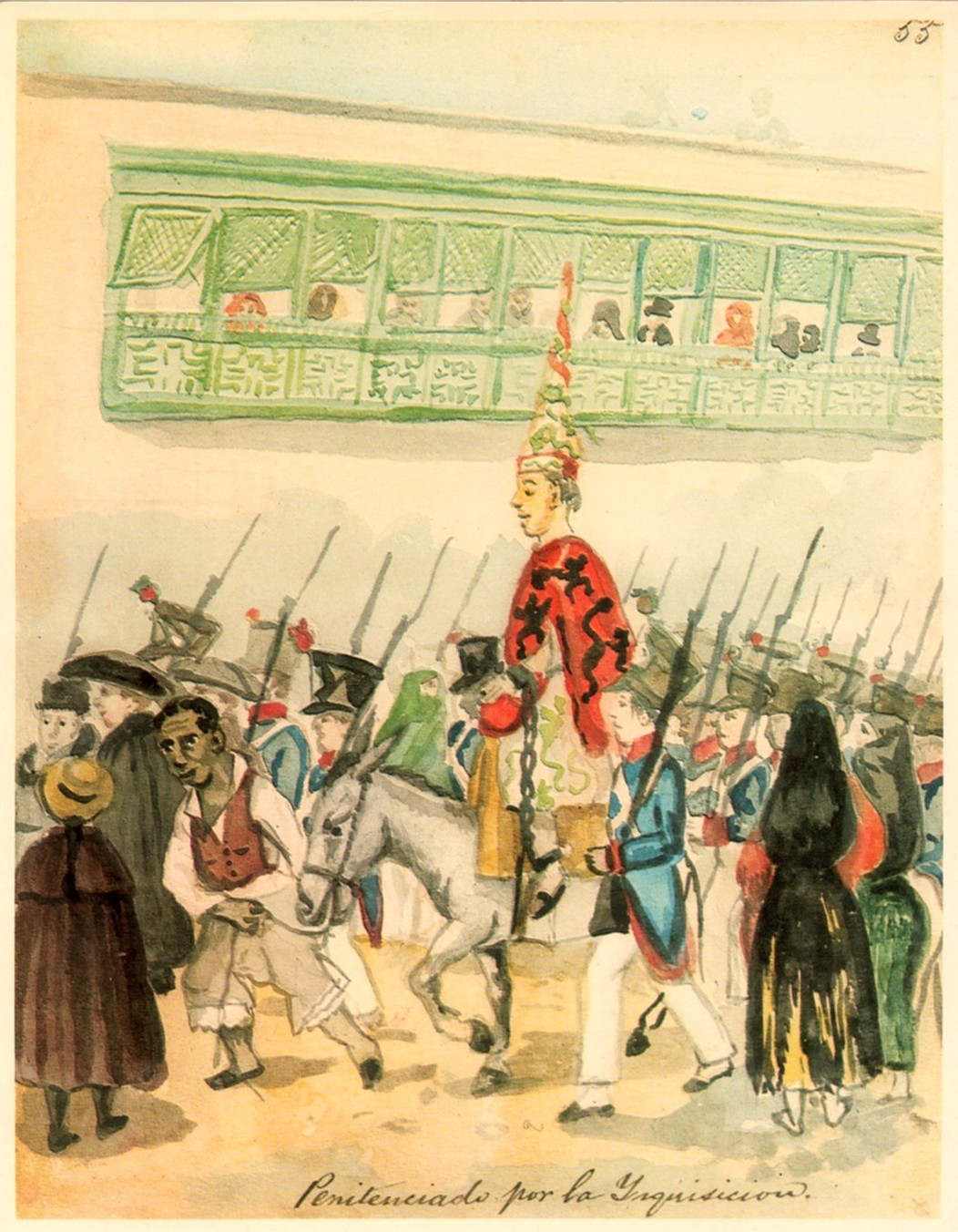 Acuarela de Pancho Fierro (Lima, 1807 - Lima, 1879)